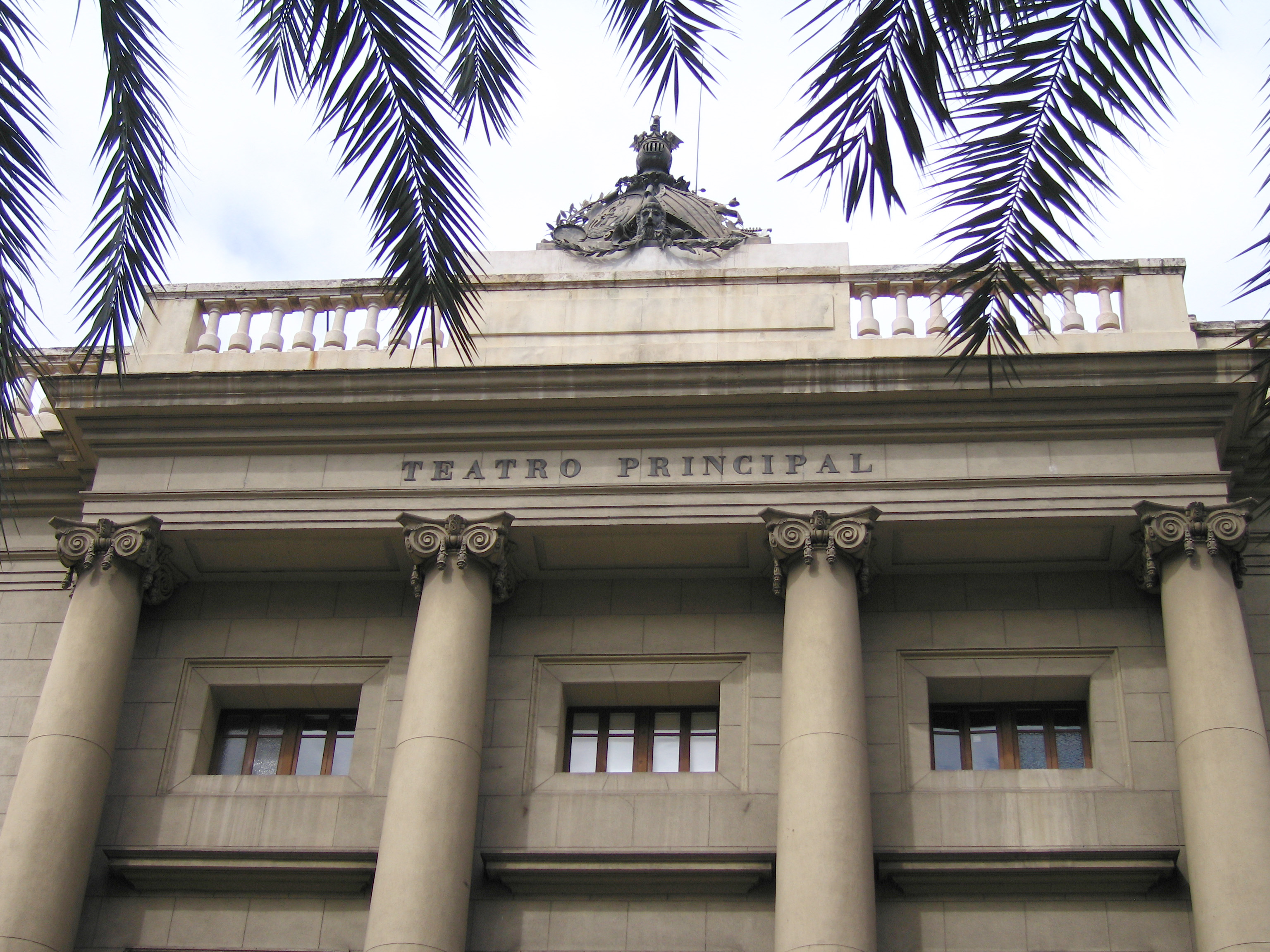 Teatre Principal València